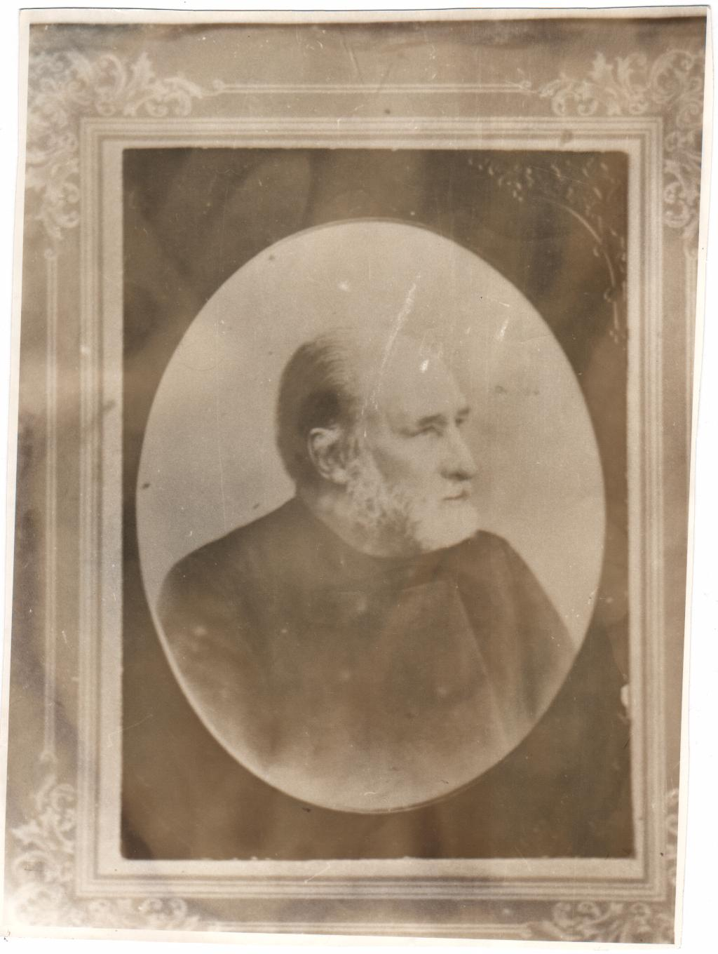 Дашков Дмитрий Дмитриевич